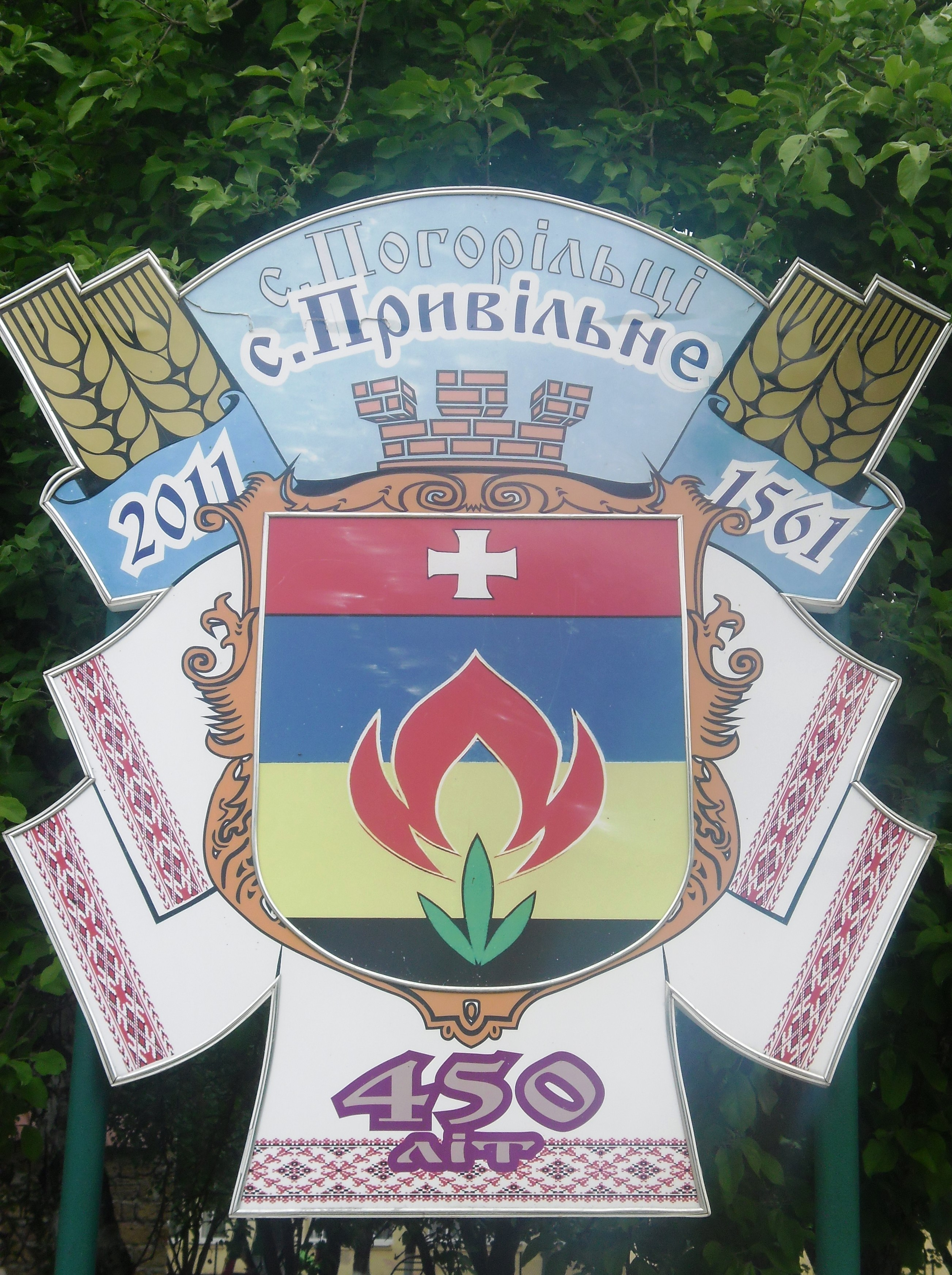 В центрі села встановлено історичний знак села: панно-герб села Привільне (дата заснування і річниця села)